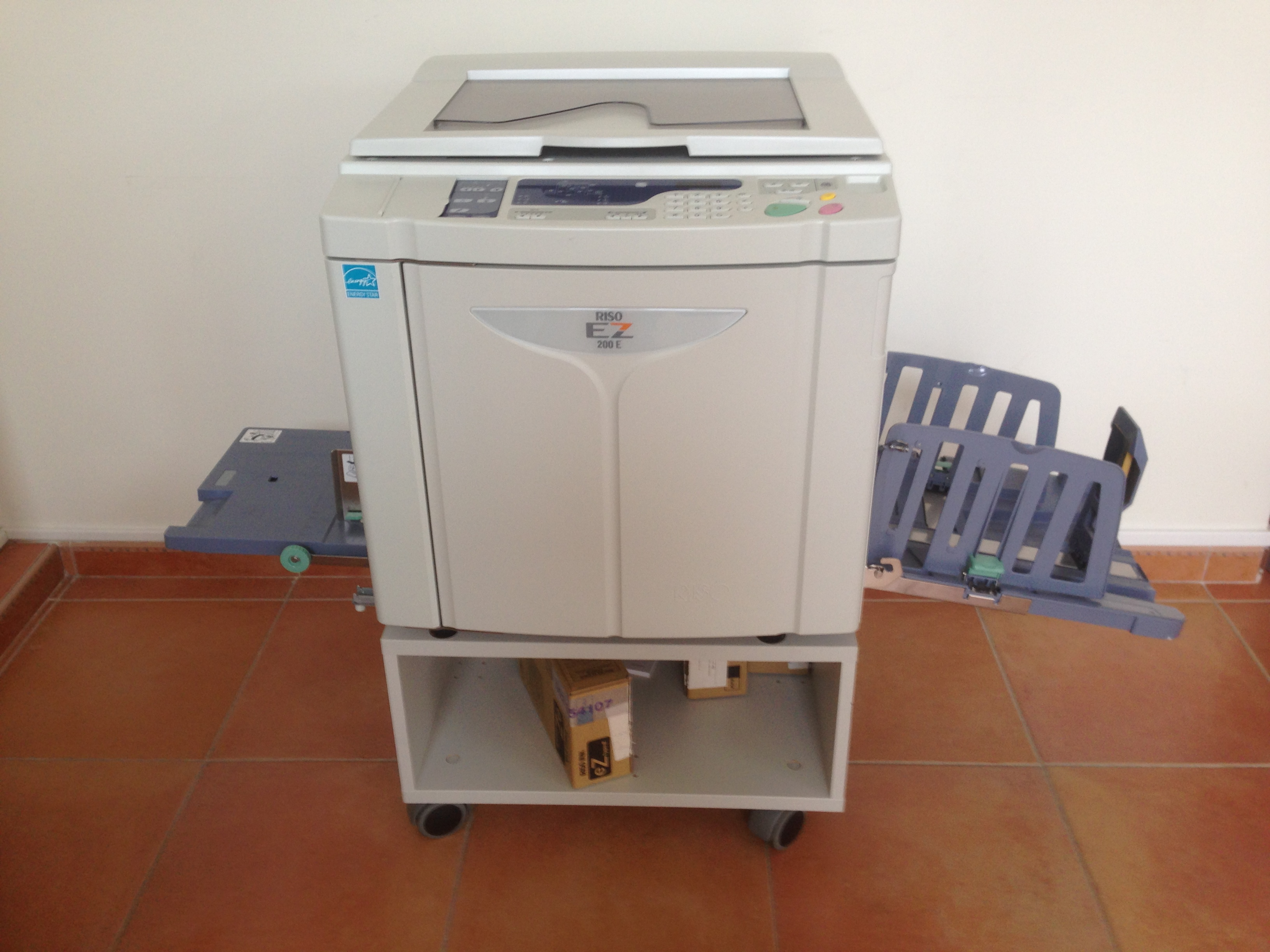 Duplicadora Riso EZ200